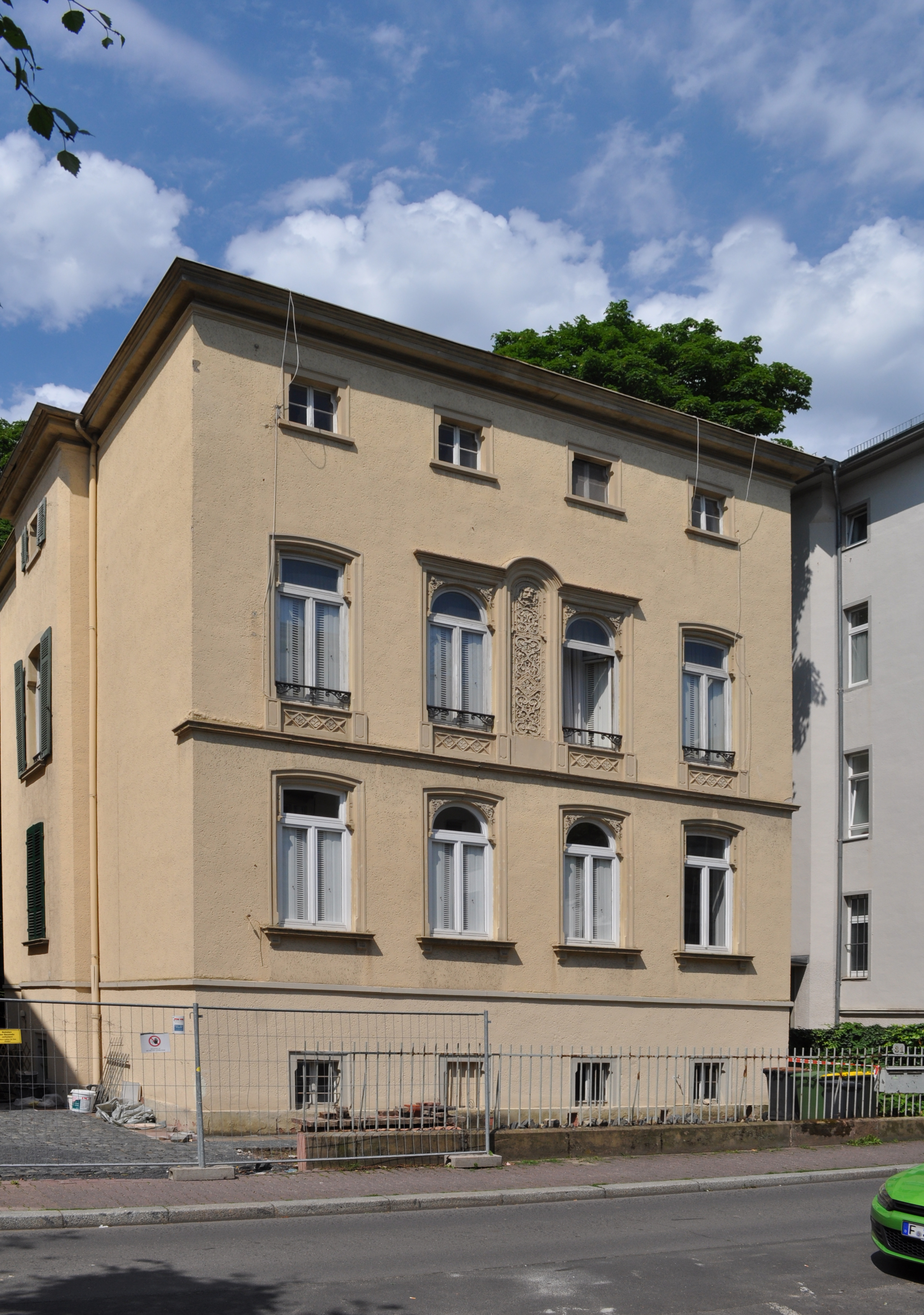 Frankfurt, im Trutz 31